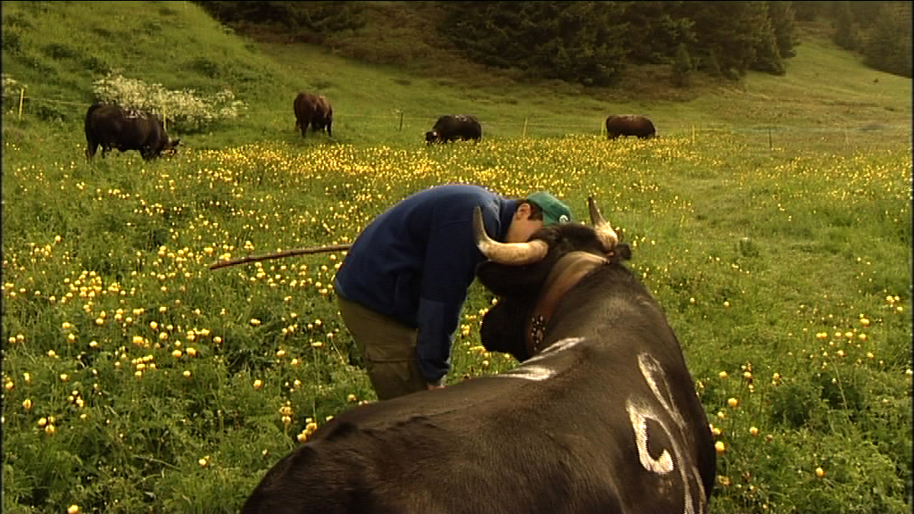 Image tirée de « Collection Premier Jour » de Fernand Melgar.